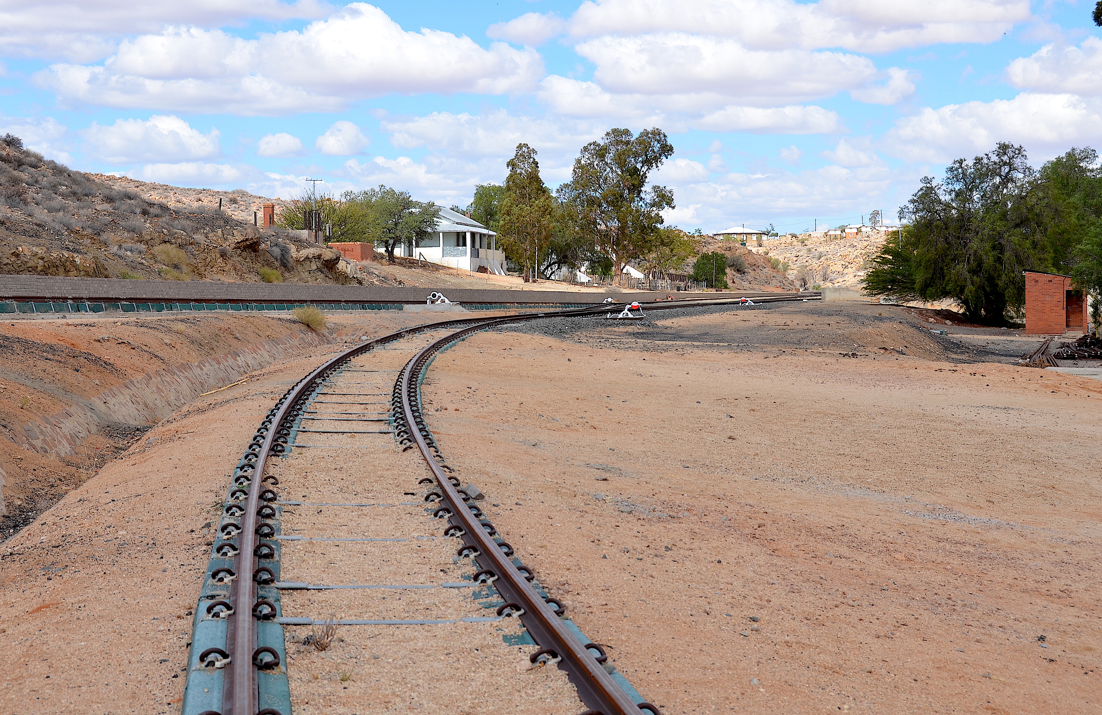 Neue Bahnlinie in Aus in Namibia (2017)